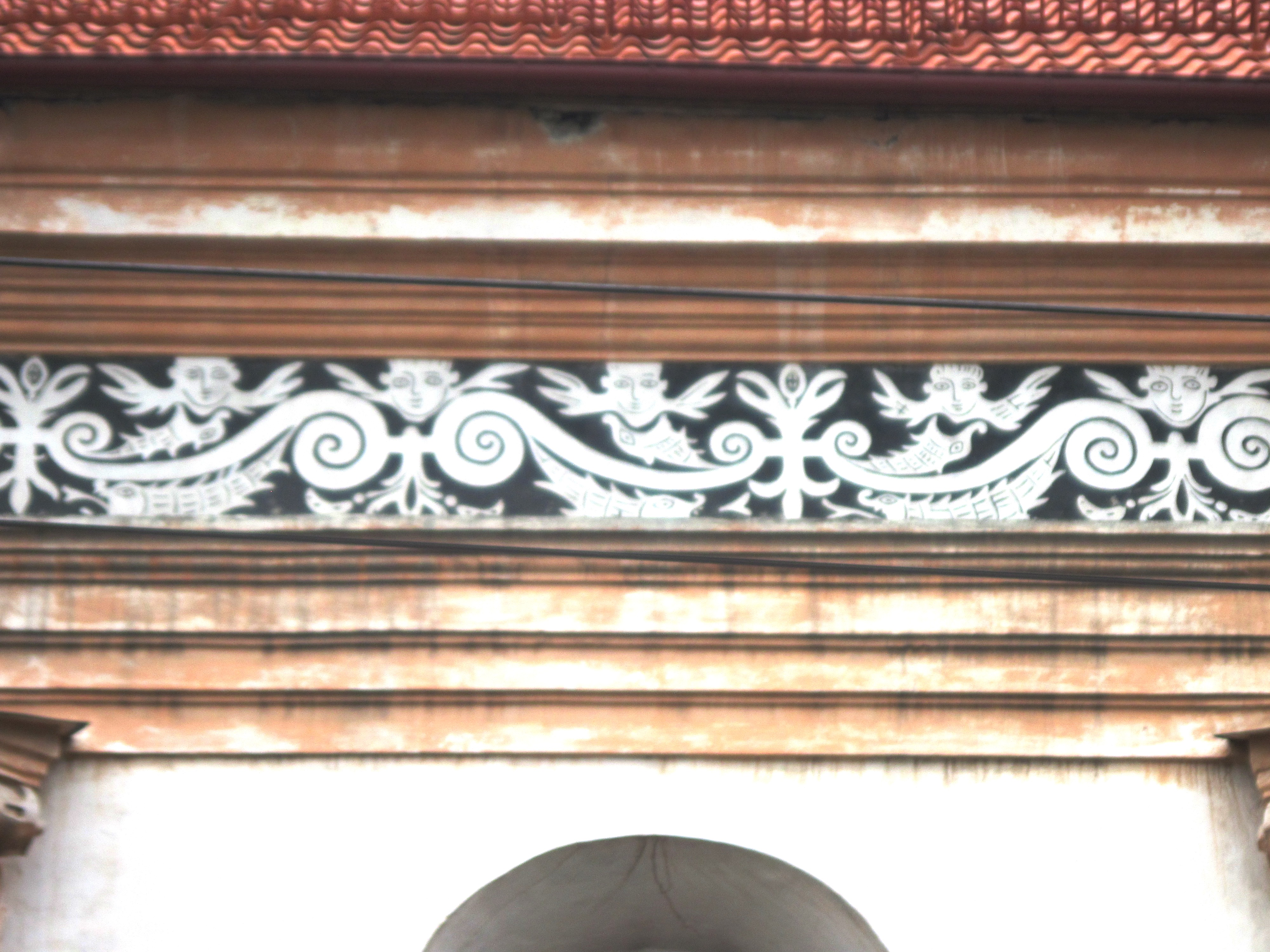 Графітавы пояс на касцёле Брыгітак у Гродна